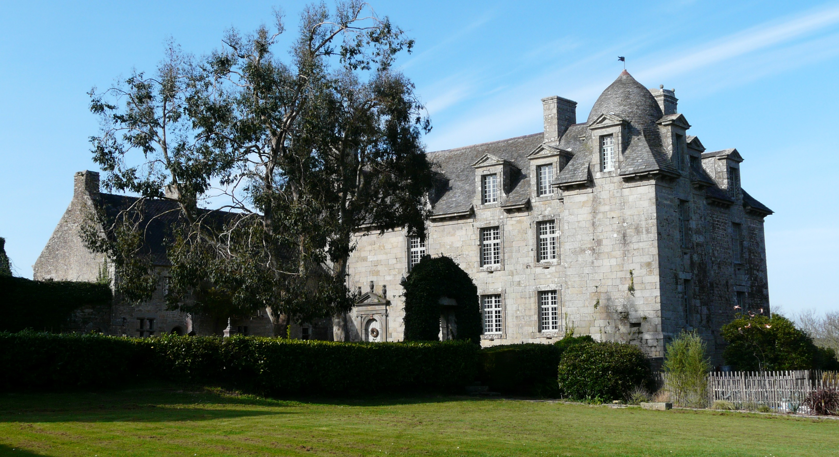 chateau de Kerouartz à Lannilis